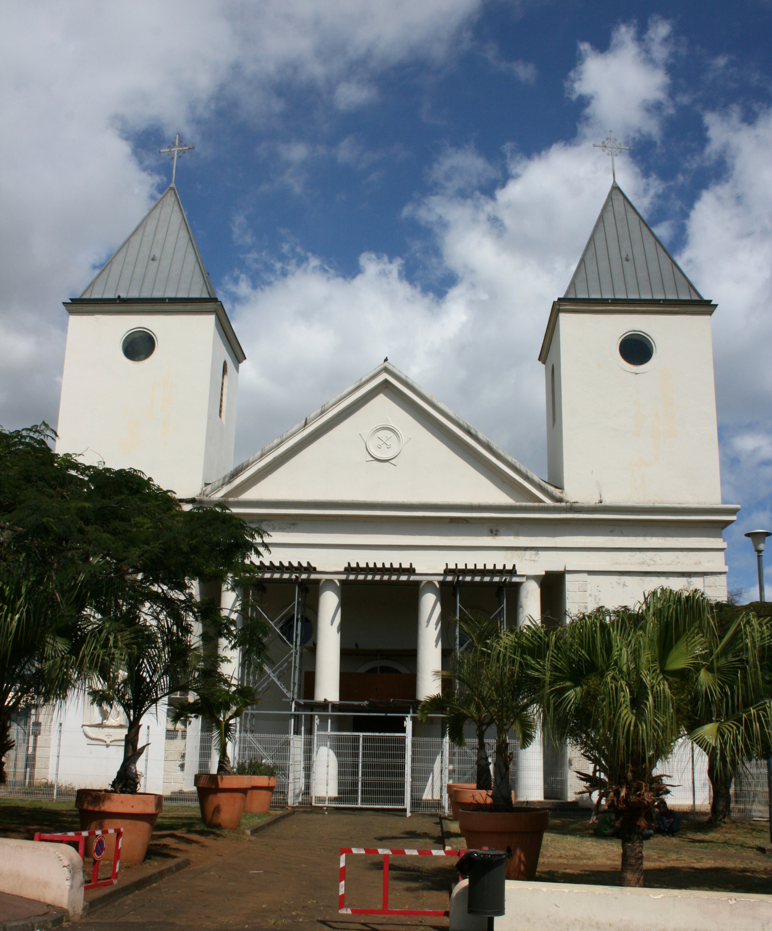 Façade de l'église Saint-Pierre-Saint-Paul, à Saint-Pierre de La Réunion.